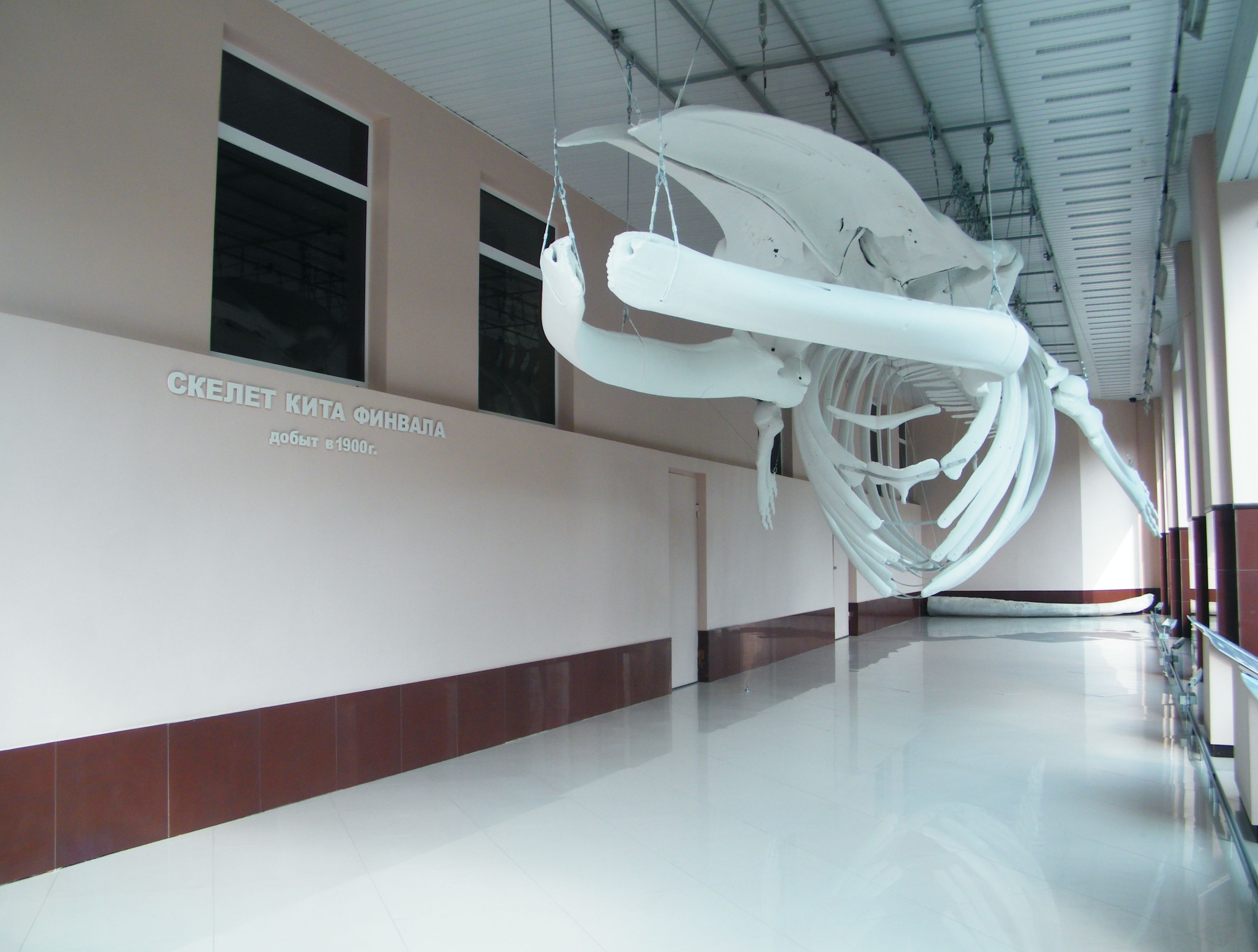 Скелет финвала в Хабаровском краеведческом музее